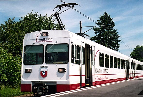 Ein Zug der Lausanne-Echallens-Bercher-Bahn beim Bahnhof Bercher